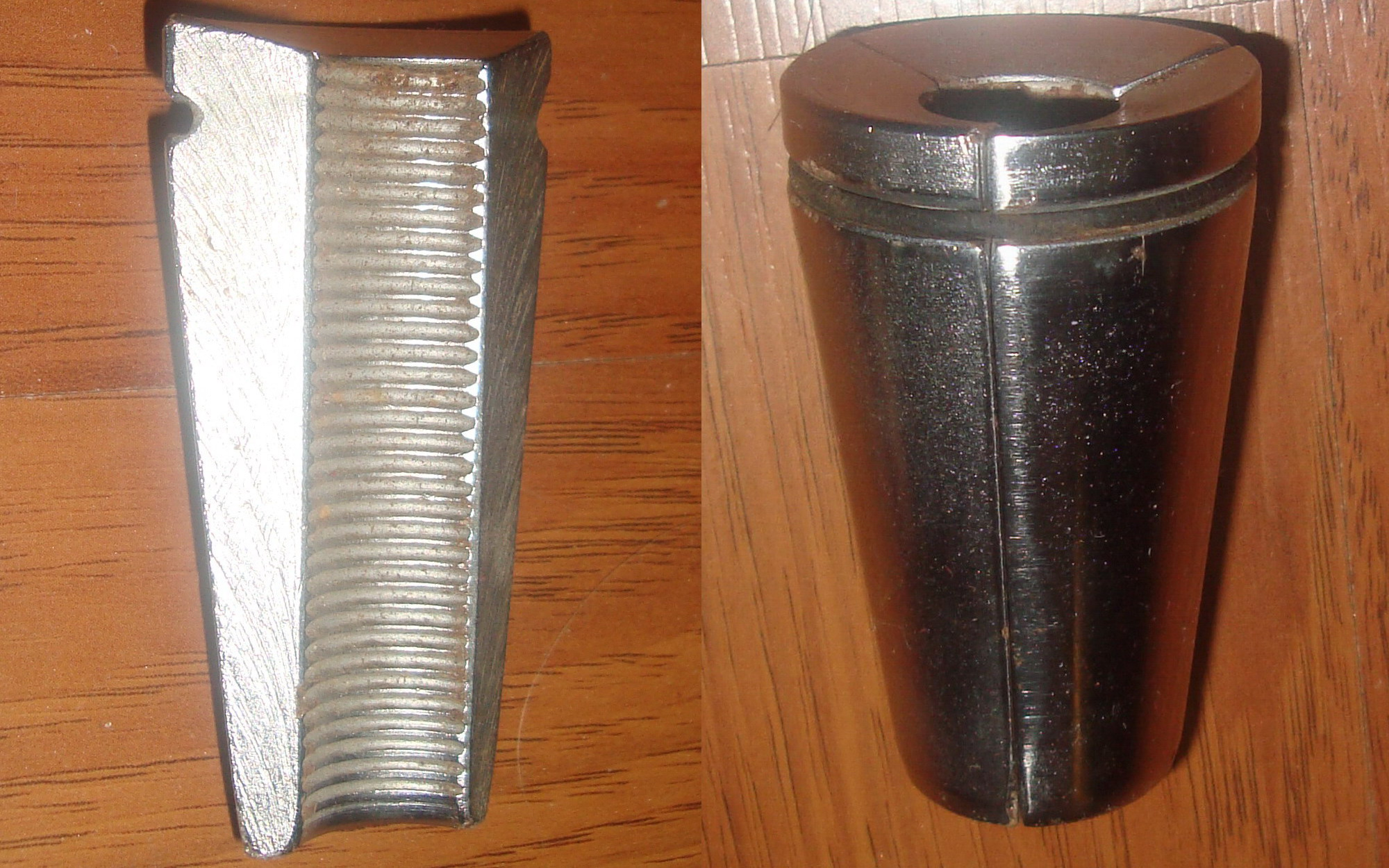 Neo cáp ứng suất trước (ba lá). Hình do tôi tự chụp.